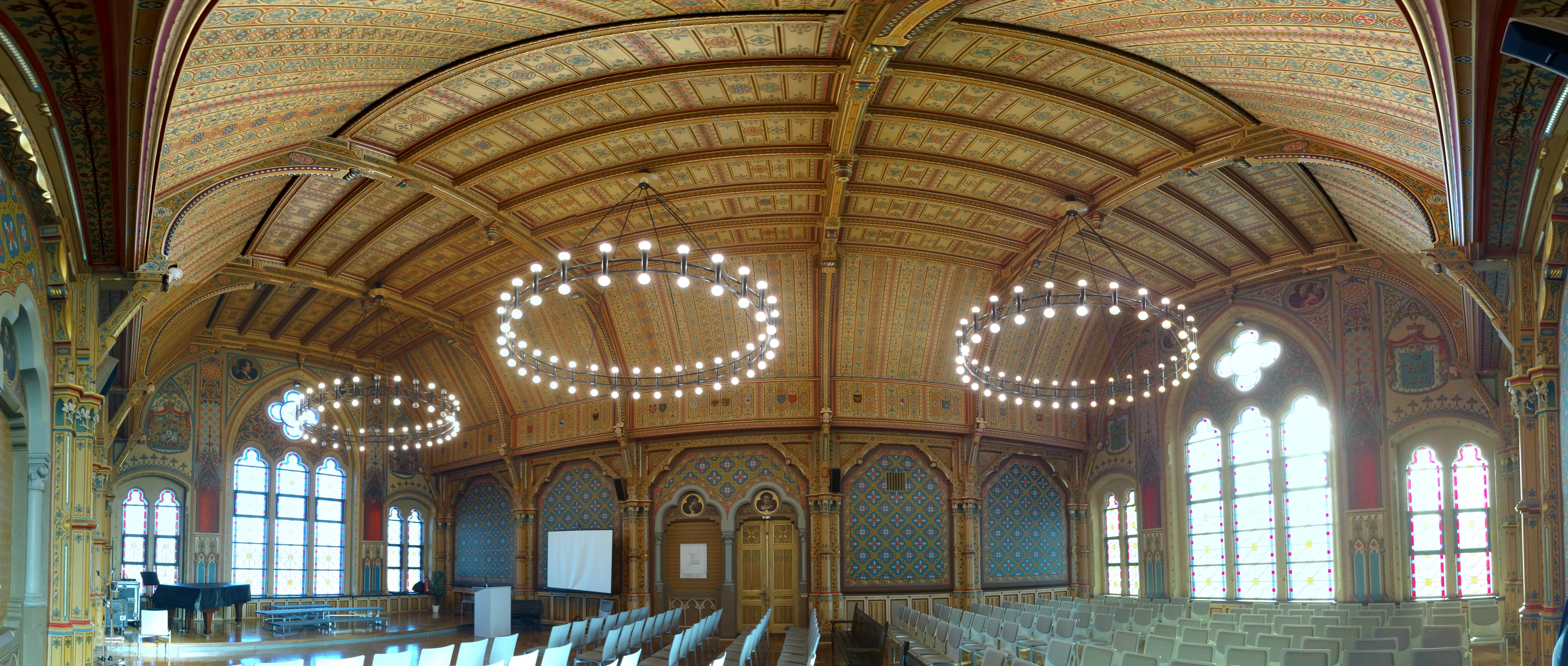 die farbenprächtig ausgestaltete Aula des Gymnasiums nach dem Vorbild Sängersaal der Wartburg im Stile des Historismus